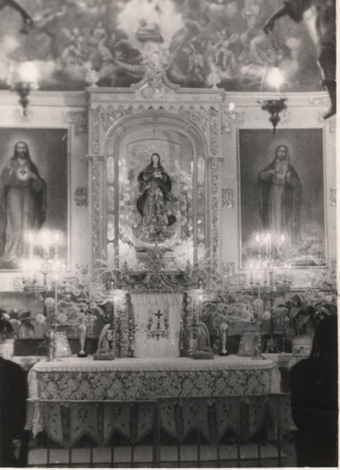 Retablo de la antigua Parroquia de Santa María de Gracia, en Montalbán de Córdoba (España).